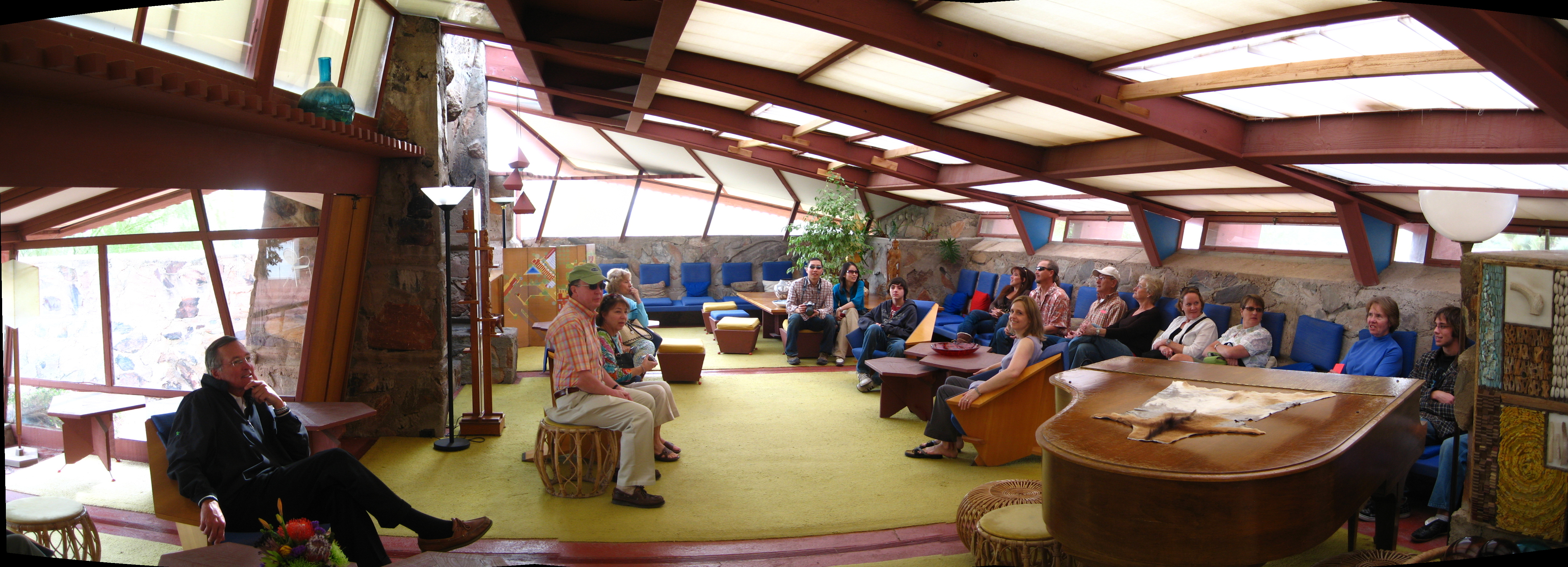 Taliesin West, Scottsdale, AZ, USA.